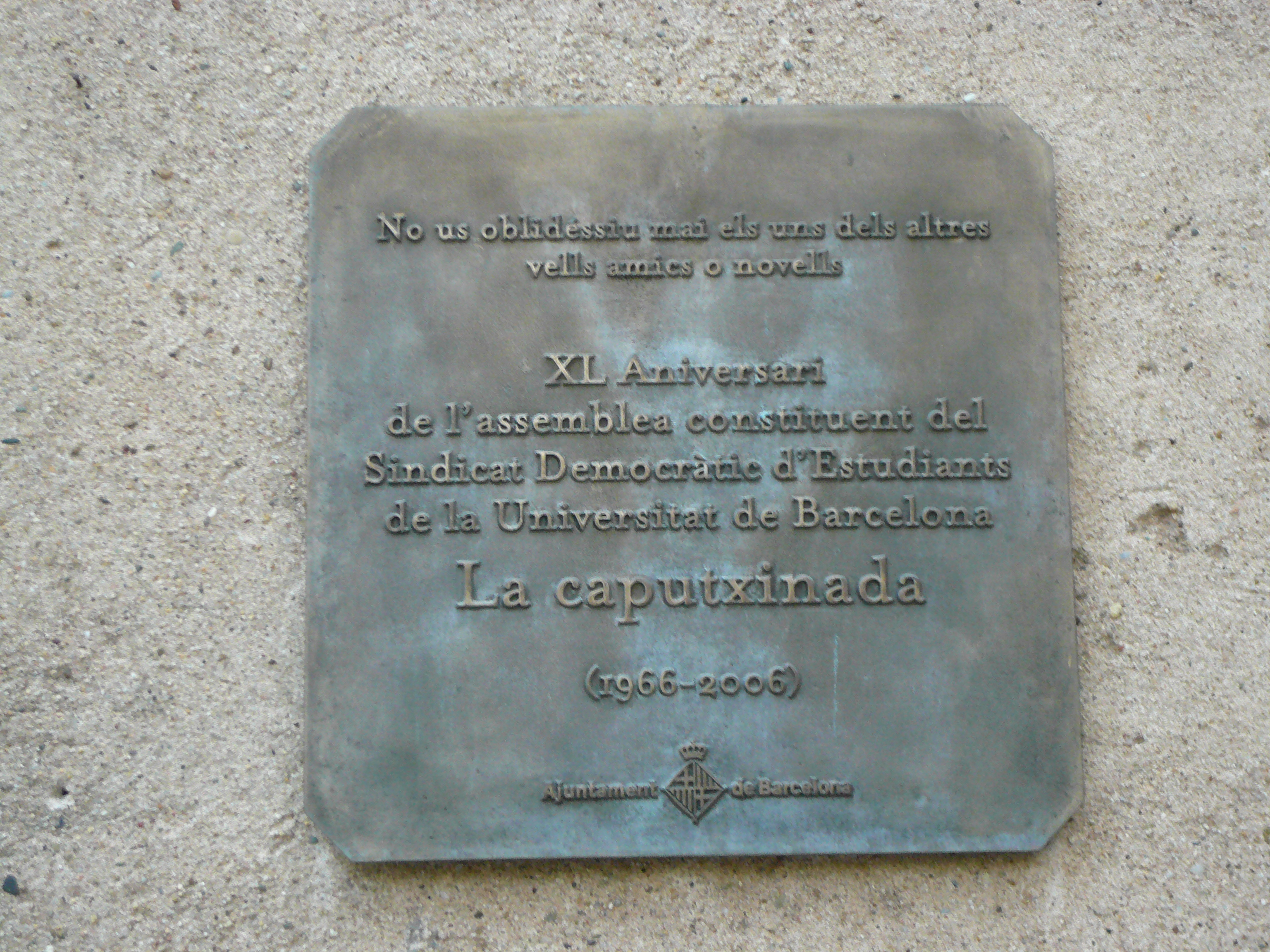 La Caputxinada. C. Cardenal Vives i Tutó, 2 (Barcelona)